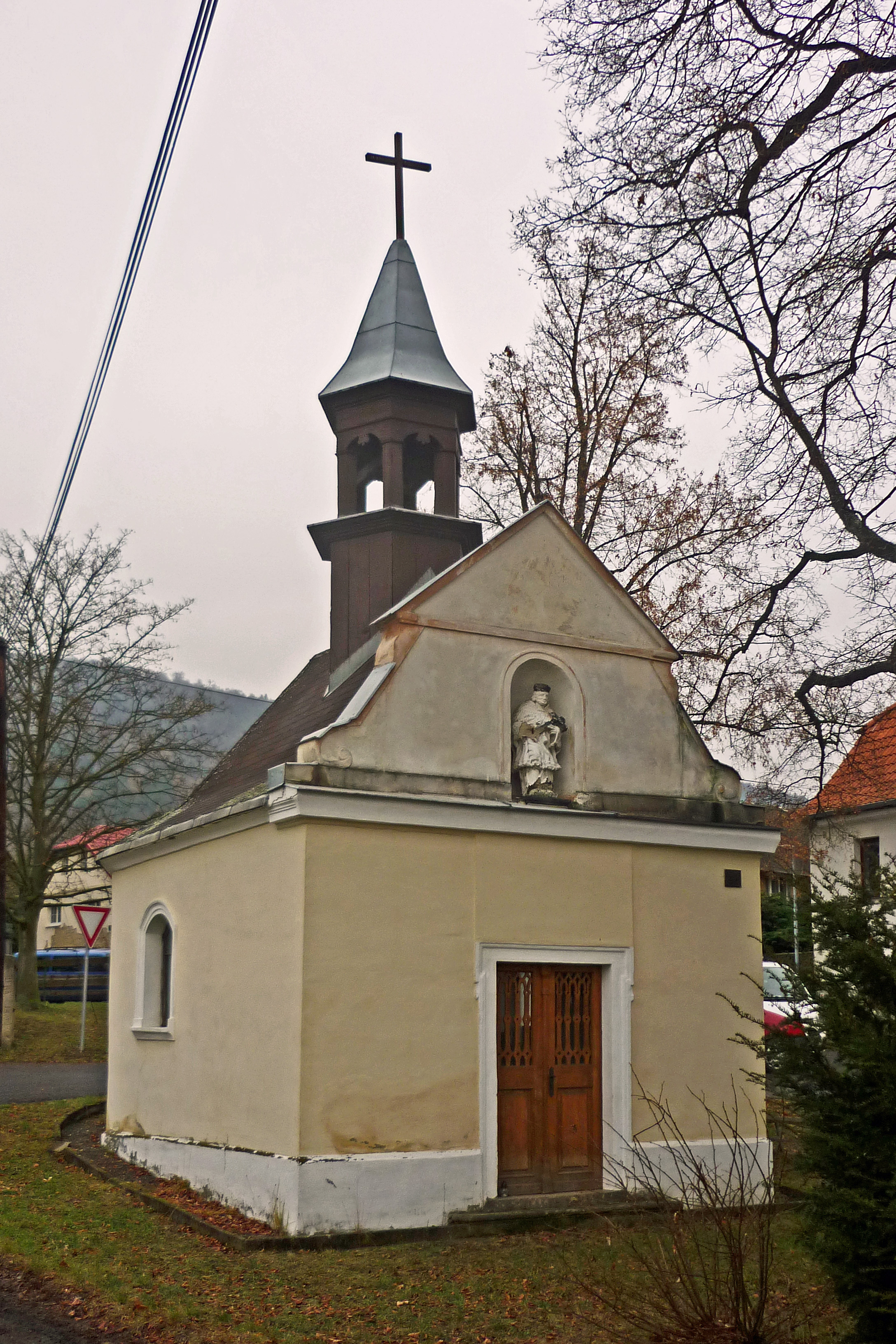 Nepomuk-Kapelle in Straden (Stradov)